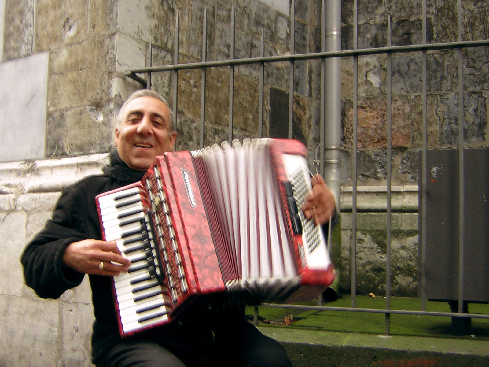 Musette on Christmasmarket